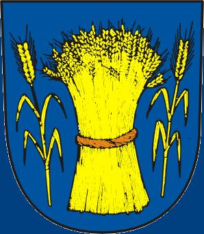 znak městyse Mšec